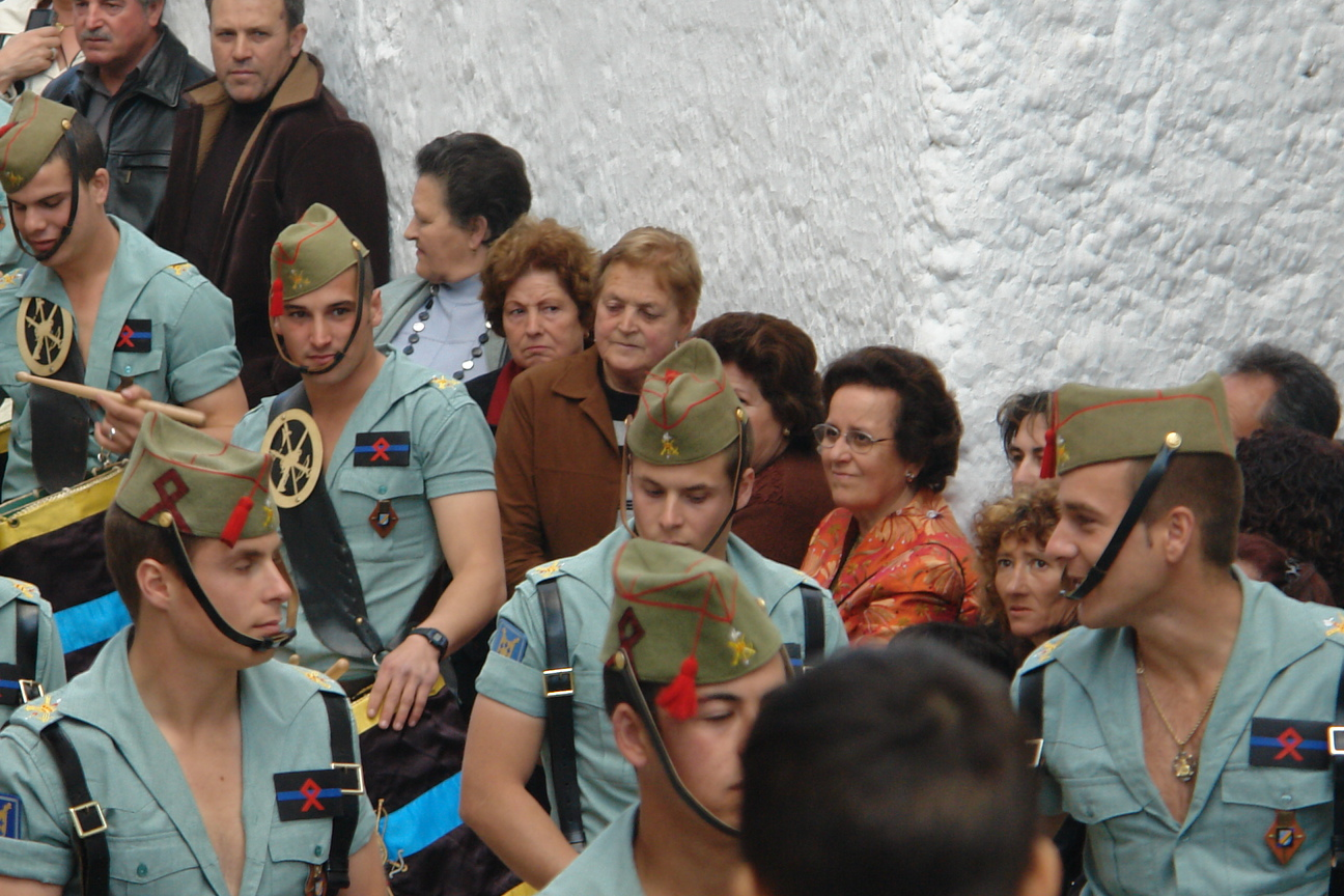 Legionarios en la procesión de San Hermenegildo, patrón de Alquife (Granada, España)